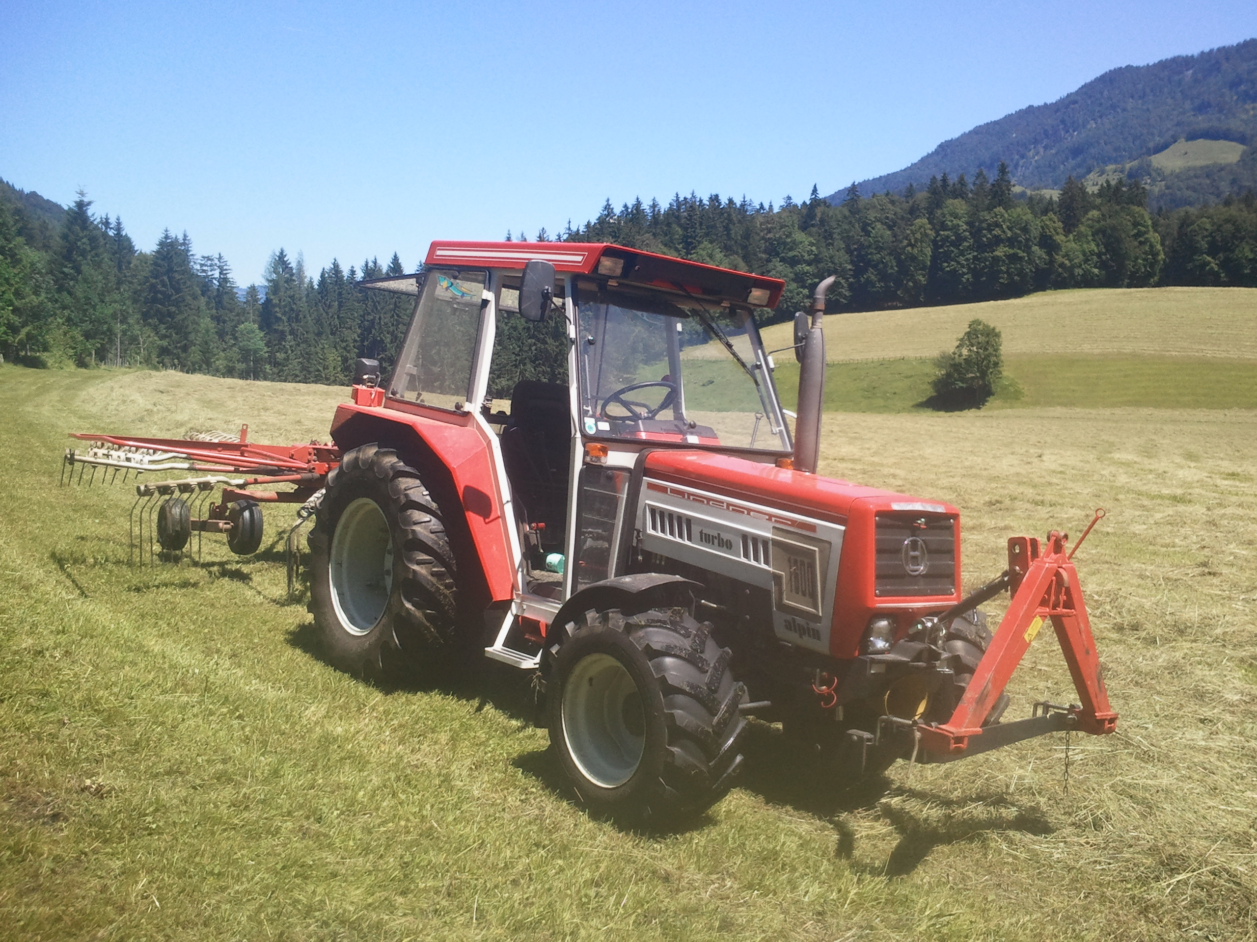 Erntearbeit mit einem Kuhn 420